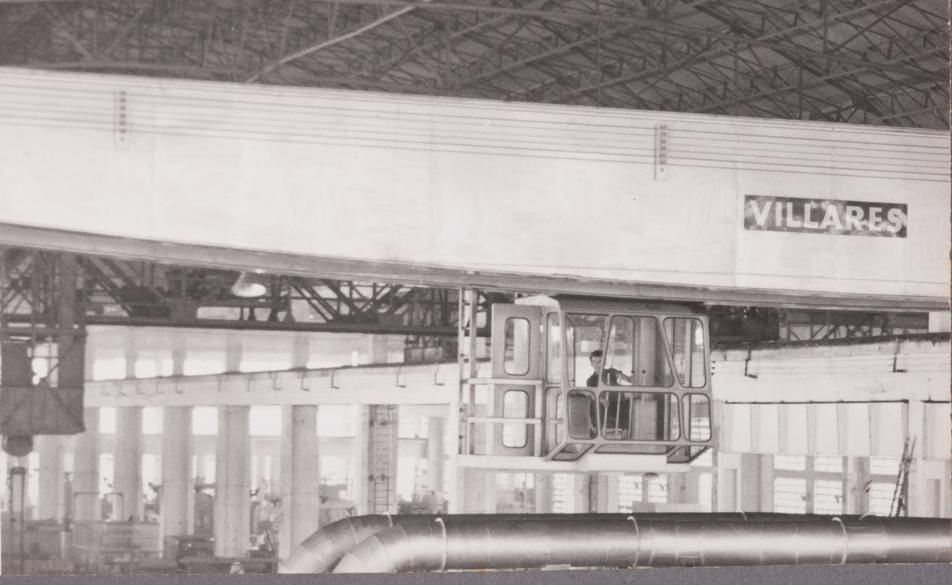 Obra que integra o acervo do Museu Paulista da USP. Coleção Werner Haberkorn - CHW